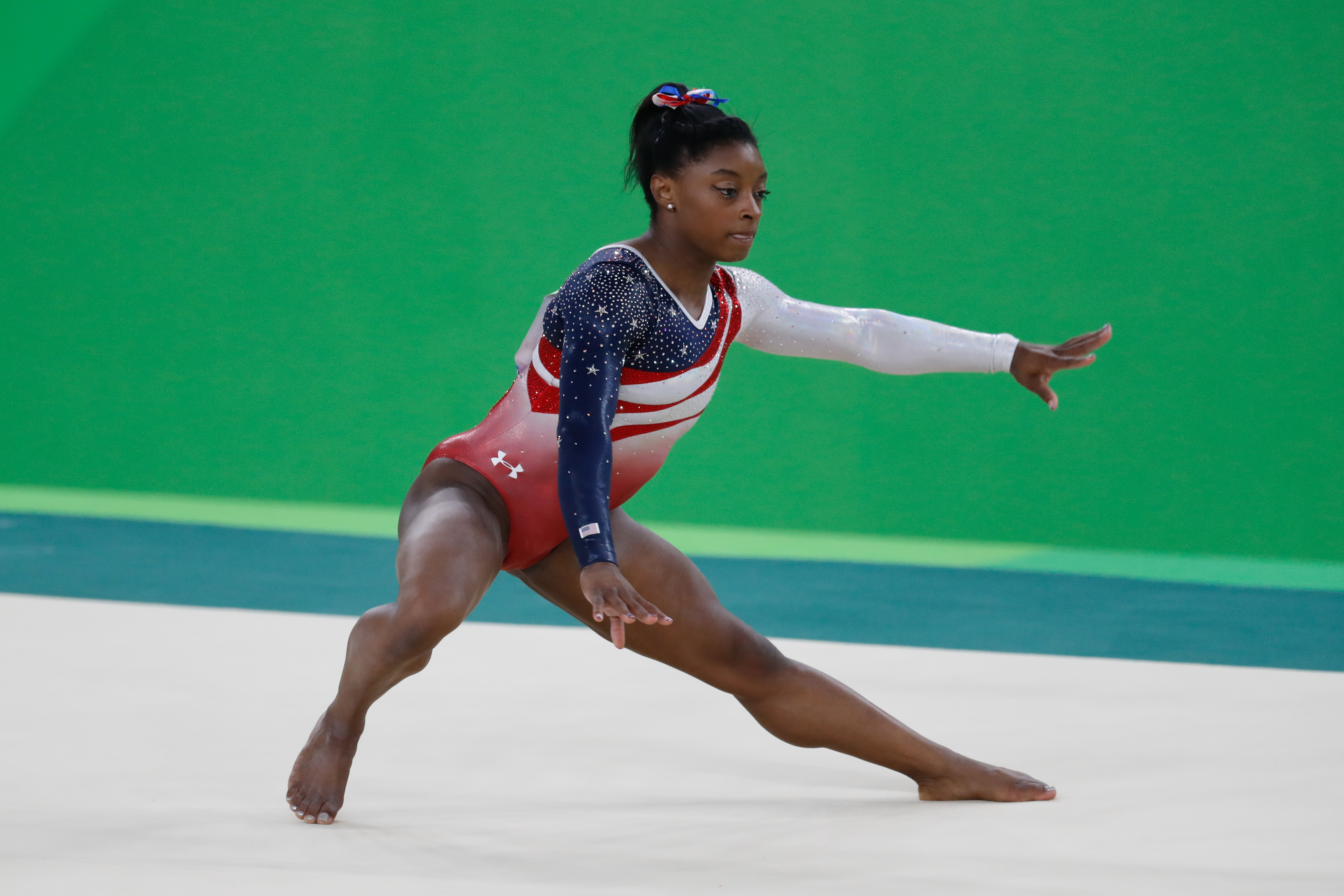 Rio de Janeiro - Simone Biles, ginasta dos Estados Unidos, durante final em que levou medalha de ouro na disputa por equipes feminina nos Jogos Olímpicos Rio 2016. (Fernando Frazão/Agência Brasil)